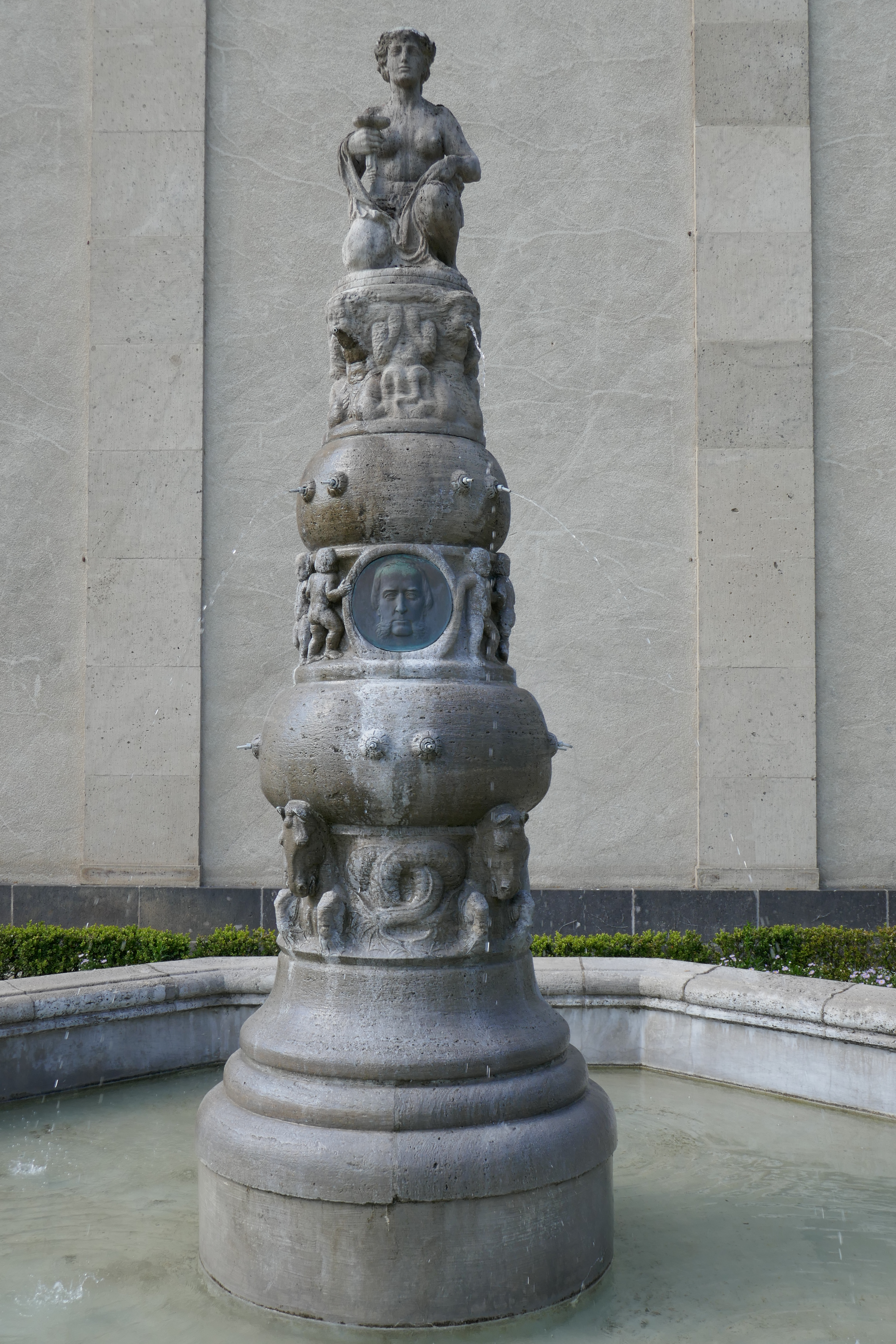 Kerckhoff-Institut, Beneke-Brunnen